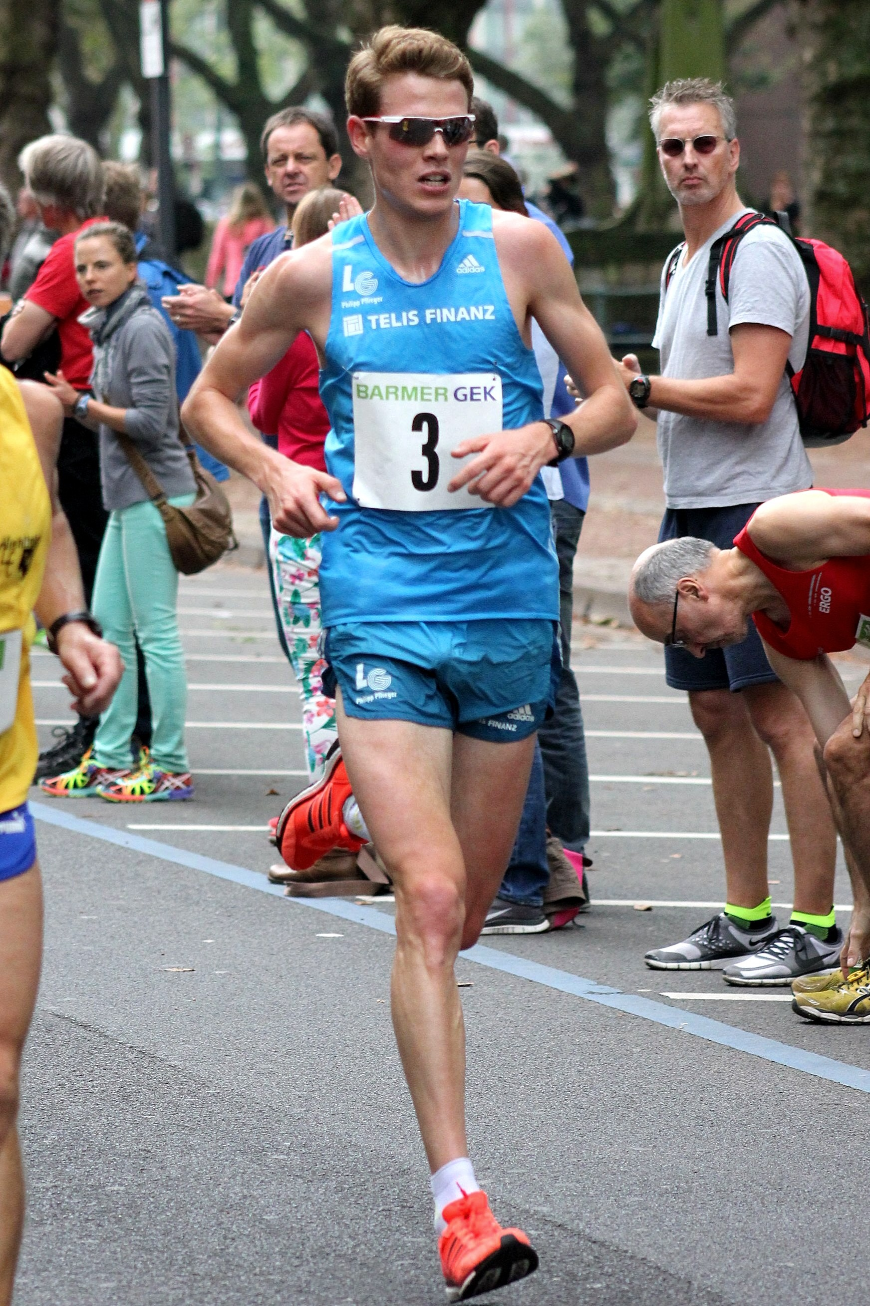 Kö-Lauf 2014, Deutsche Straßenlaufmeisterschaften 10 km